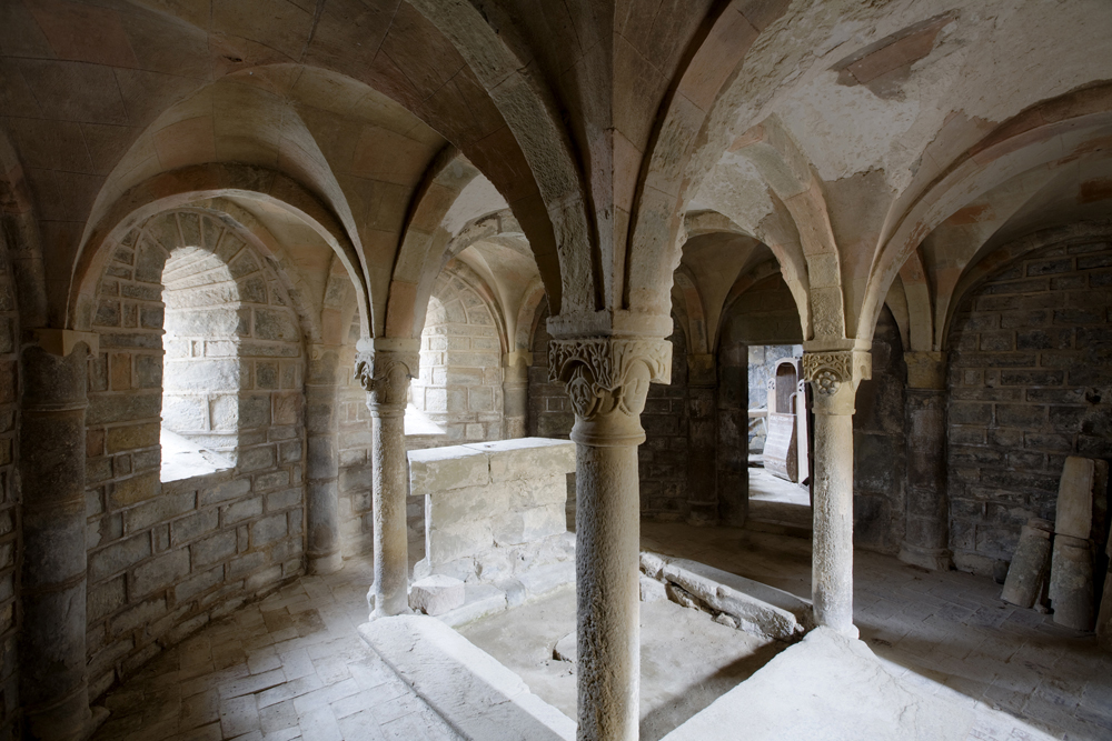 La Cripta